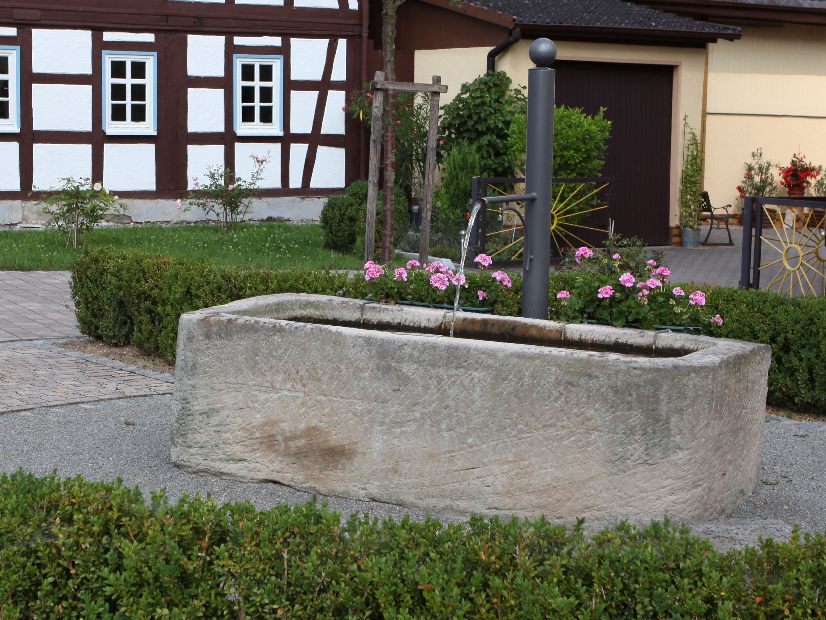 Brunnen in Rudelsdorf, OT von Bad Rodach